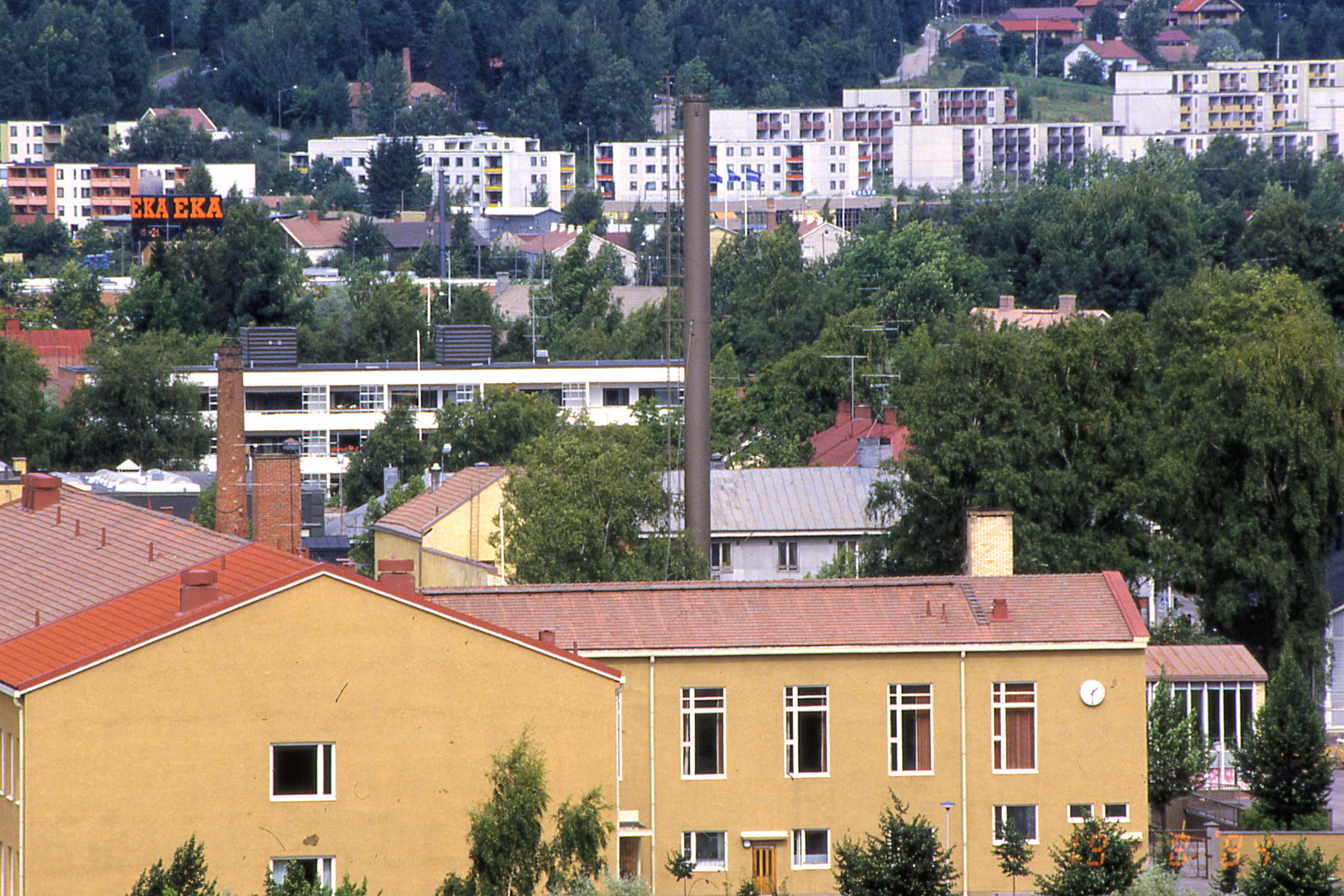 Kaupunkikuvaa Salosta vuonna 1984